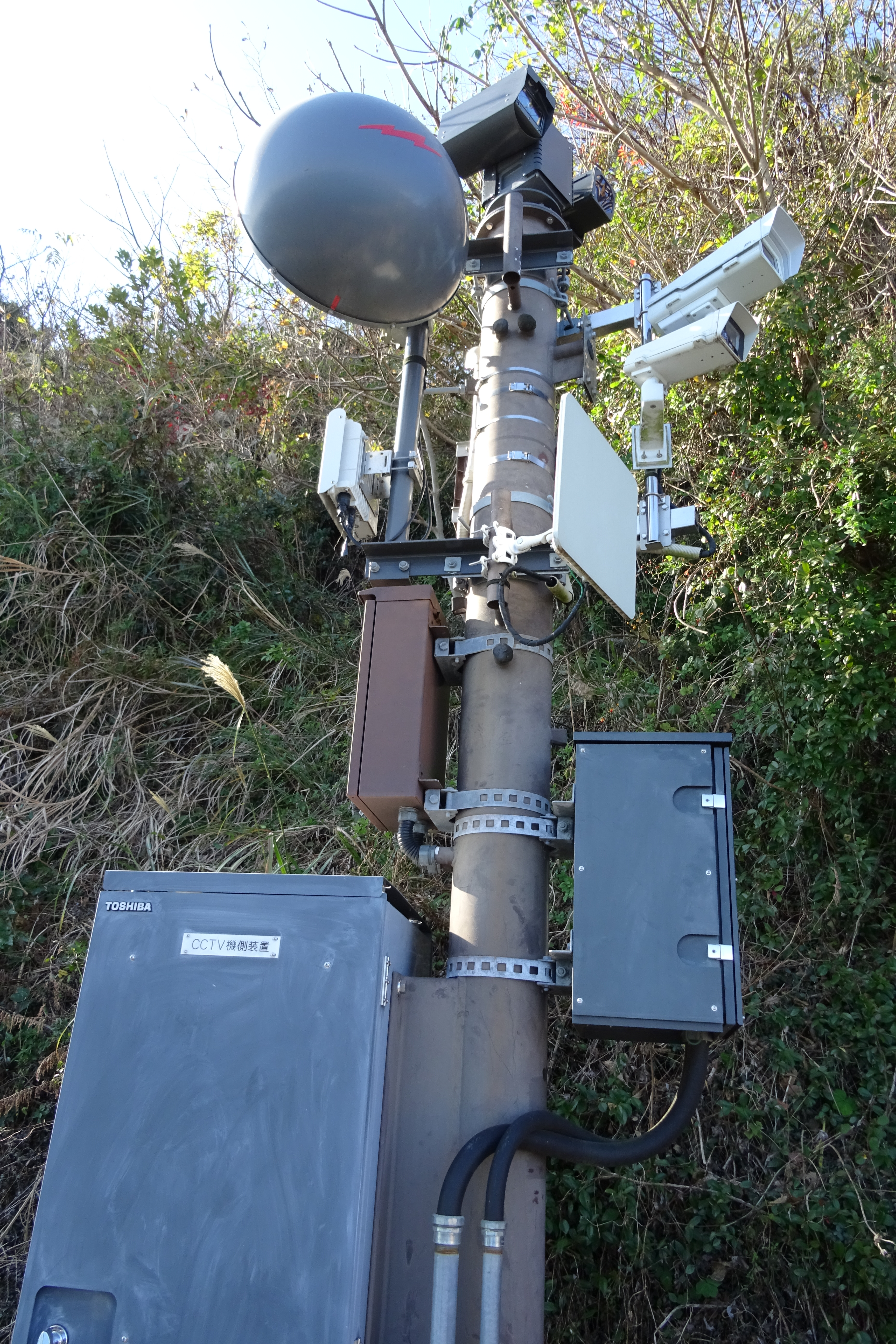 薩埵峠ライブカメラ